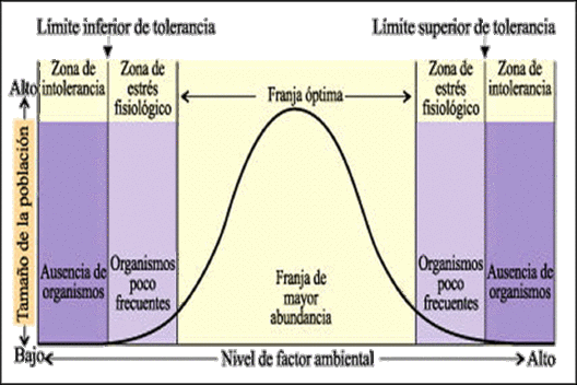 Ley de tolerancia de Shelford en poblaciones.